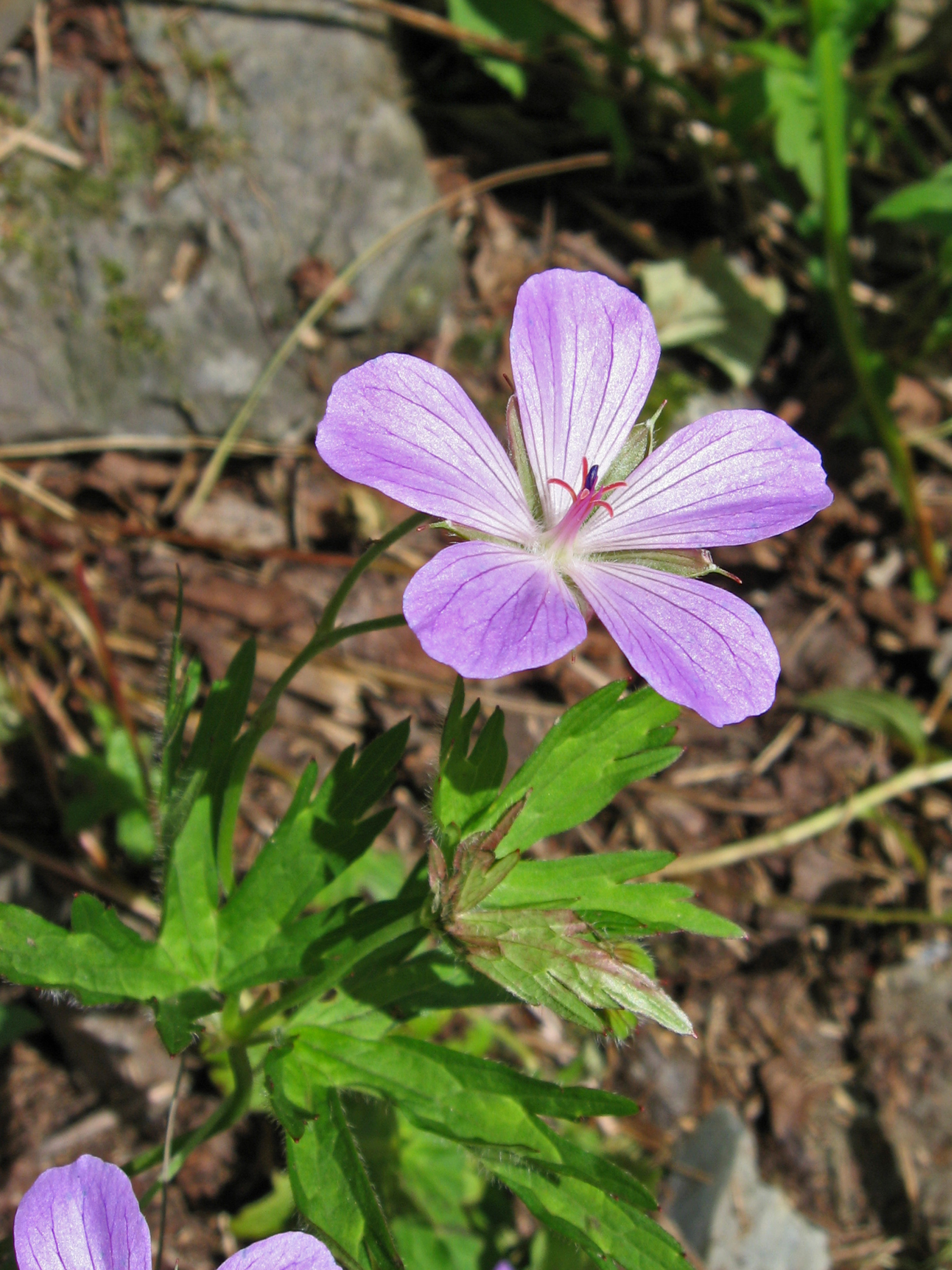 ハクサンフウロ